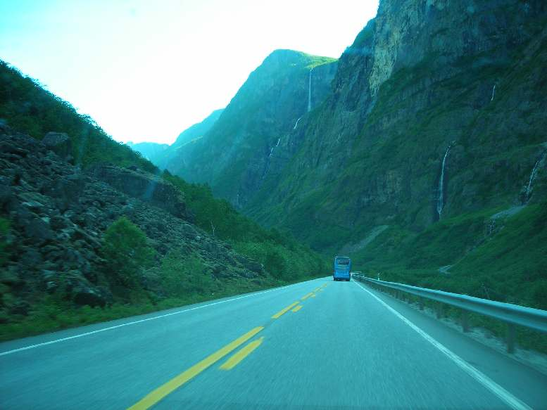 Road E16 near Gudvangen, Norway